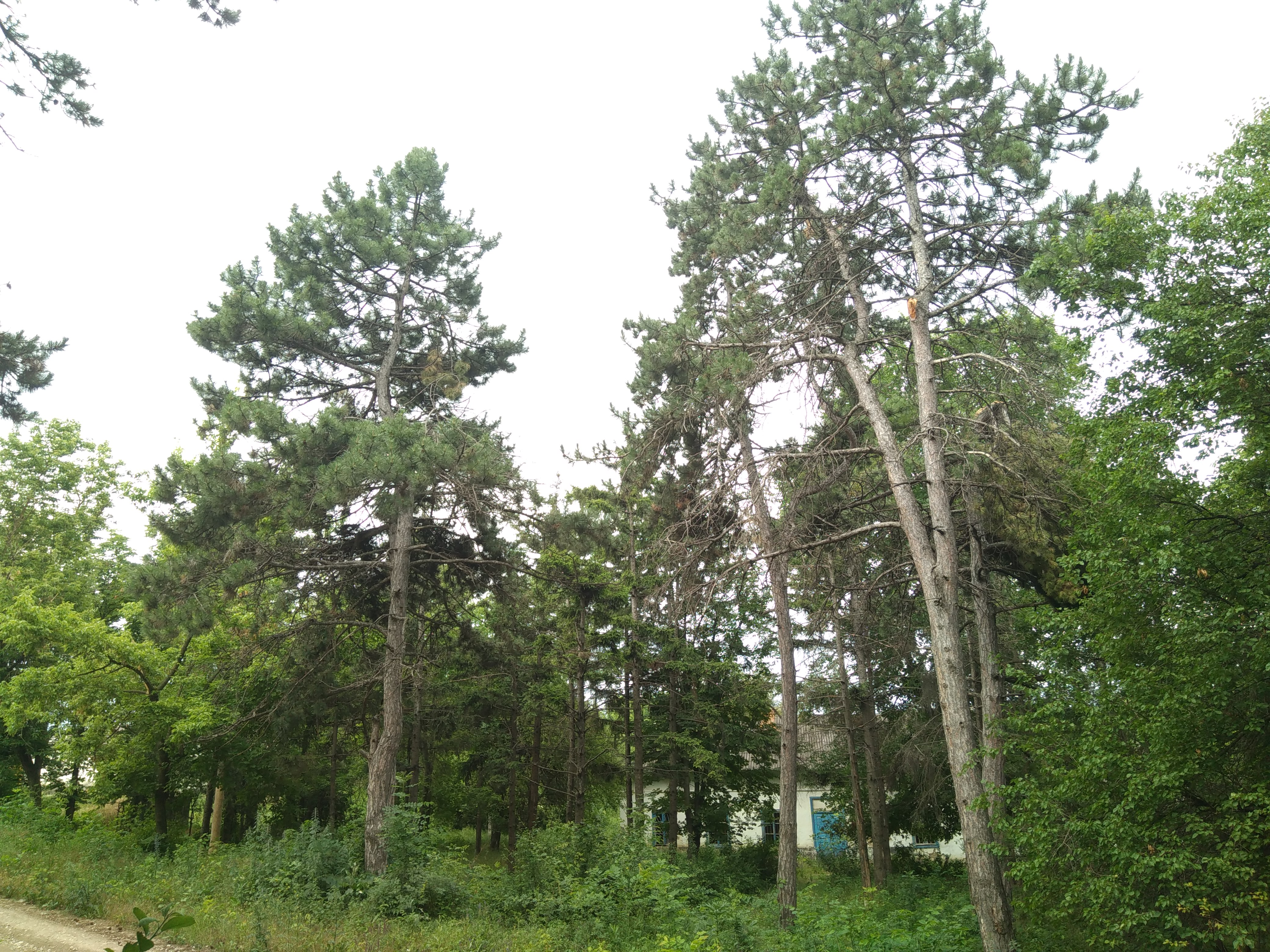 Parcul din satul Bălăbănești, monument al naturii amplasat în raionul Criuleni, satul Bălăbănești (cod MD-CR-map-007)